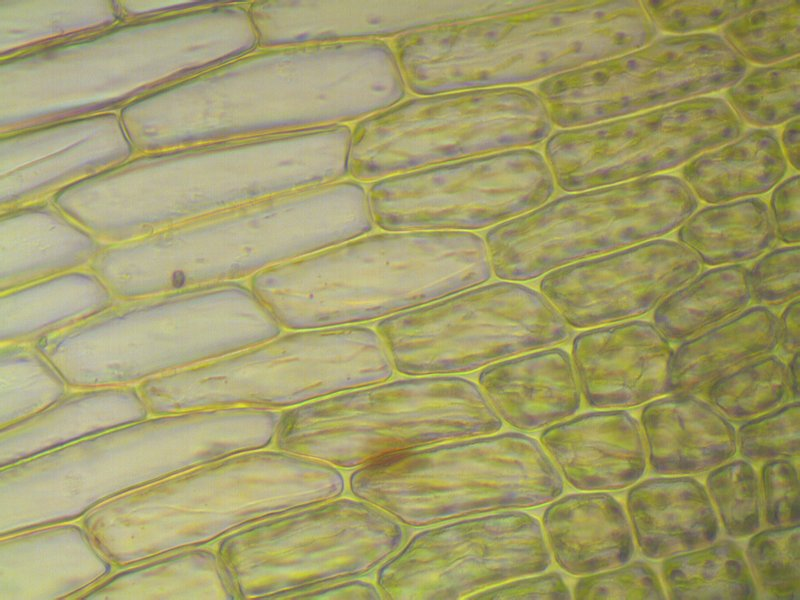 Laminazellen am Blattgrund von Tortula ruralis, Rostock